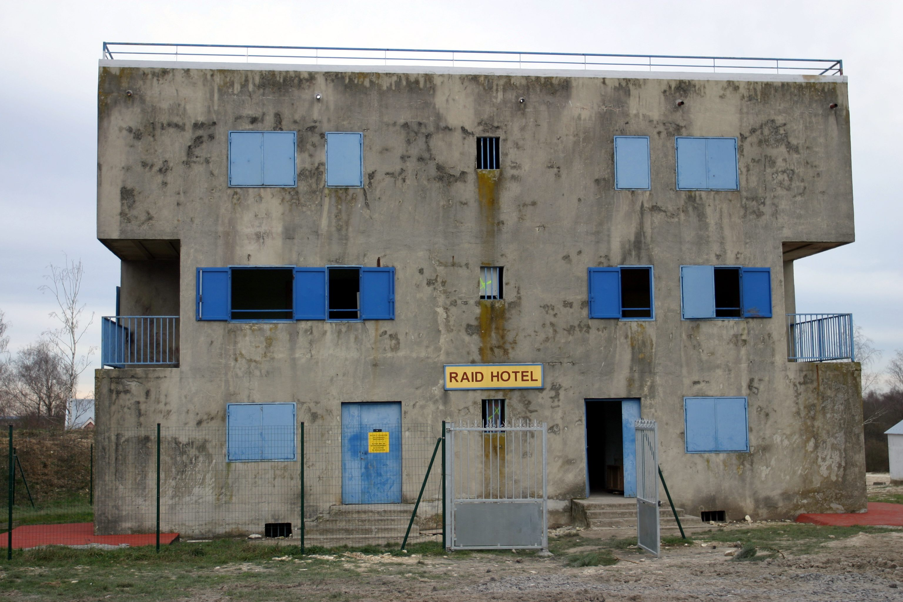 Photo de l'hôtel principal du village de combat de Beauséjour au Centre d'entraînement au combat en zone urbaine de Sissonne en France